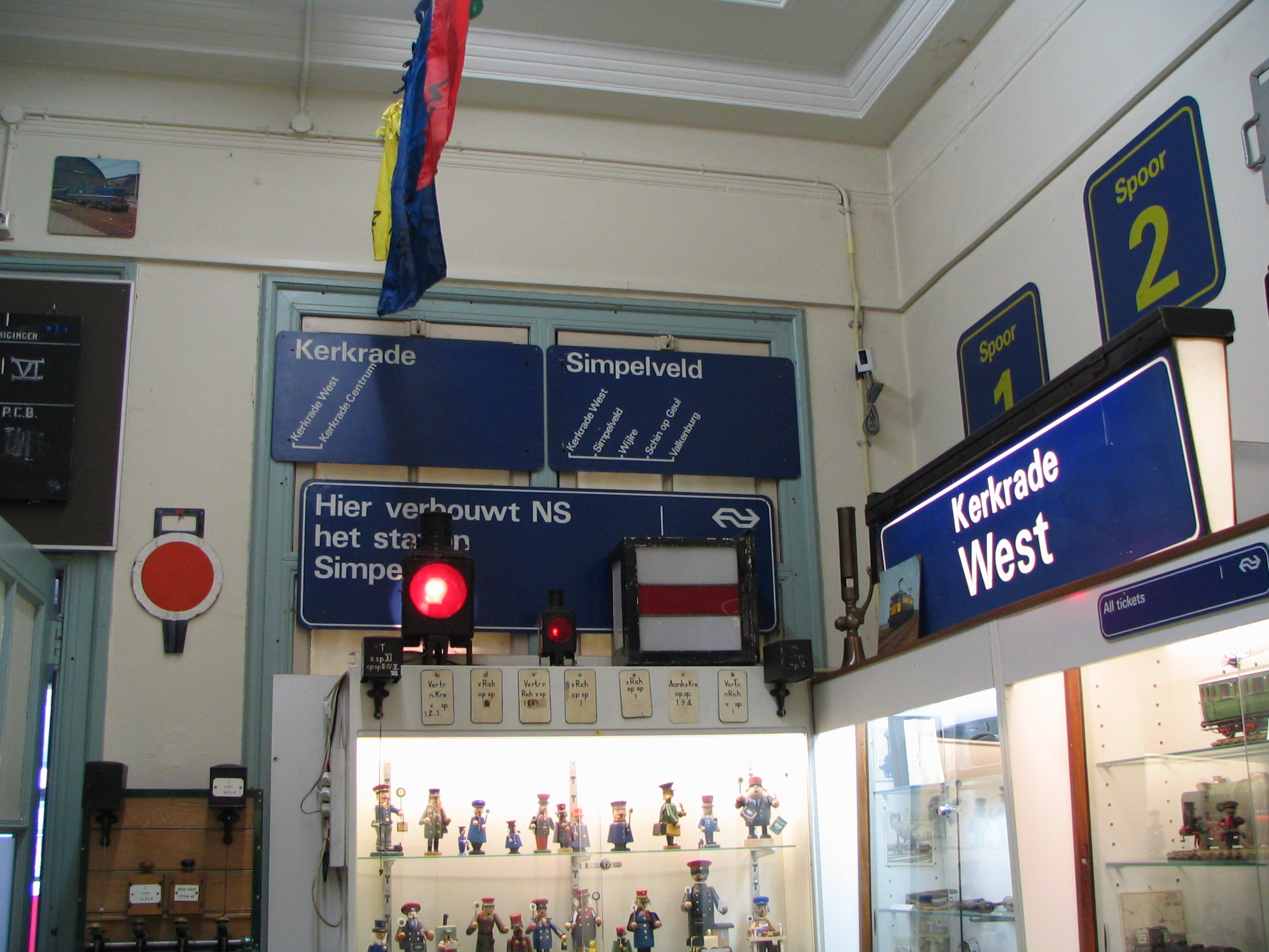 Routeborden van voormalig station Kerkrade West, te bezichtigen op station Simpelveld